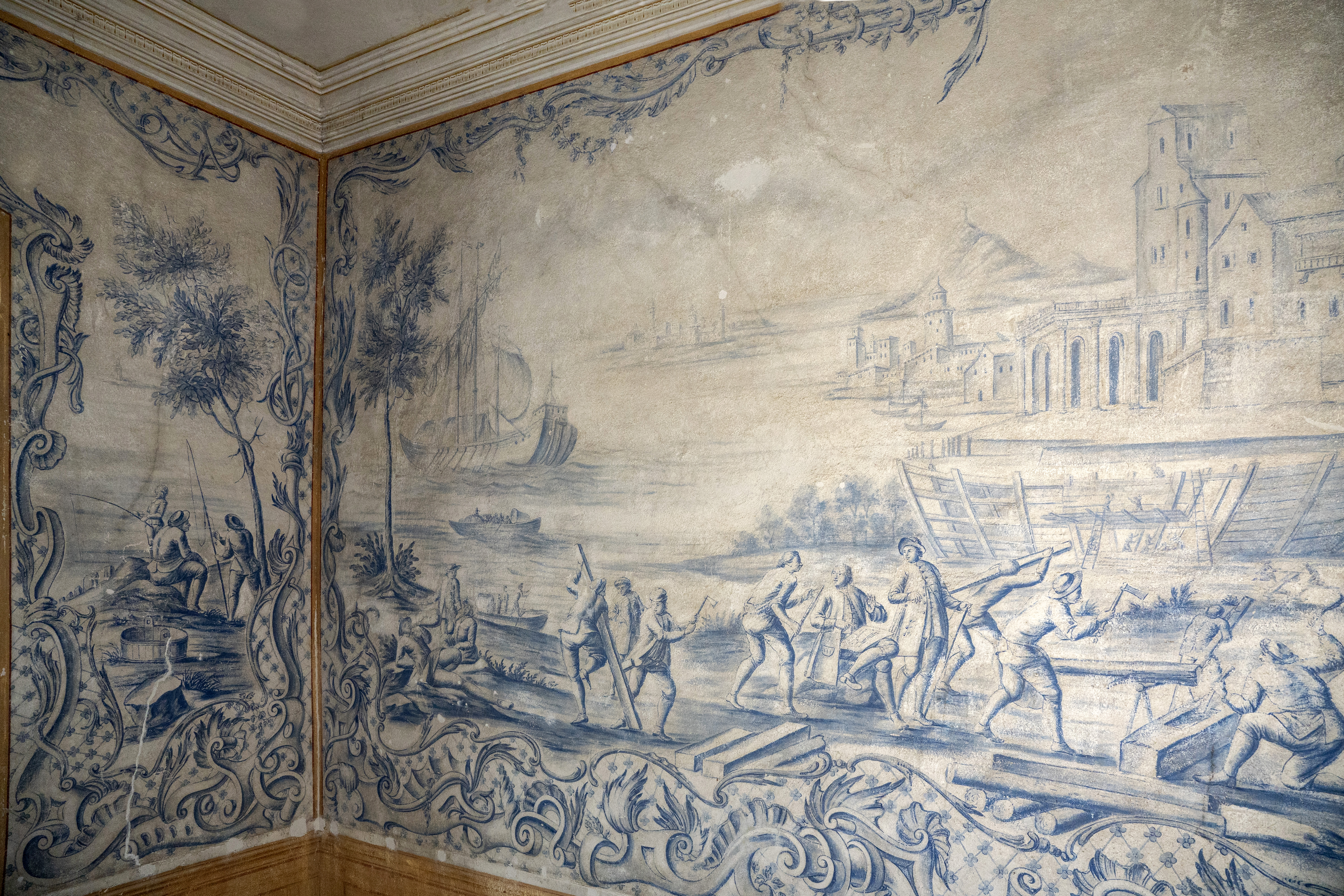 Modrý salónek zámku Peruc, výmalba